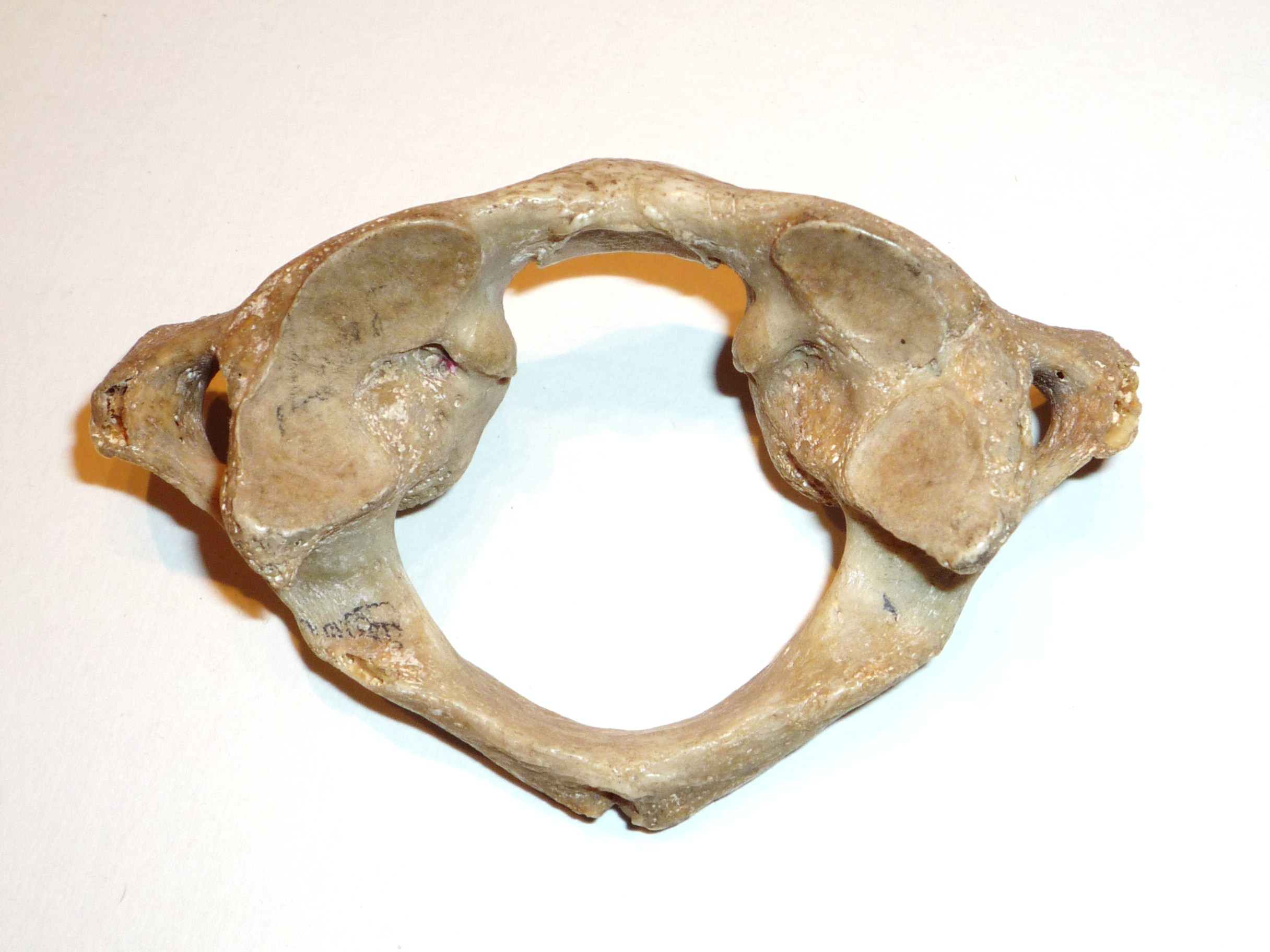 Atlante, prima vertebra cervicale, vista superiore